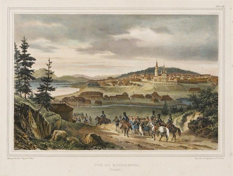 Литография "Вид на Богословск"